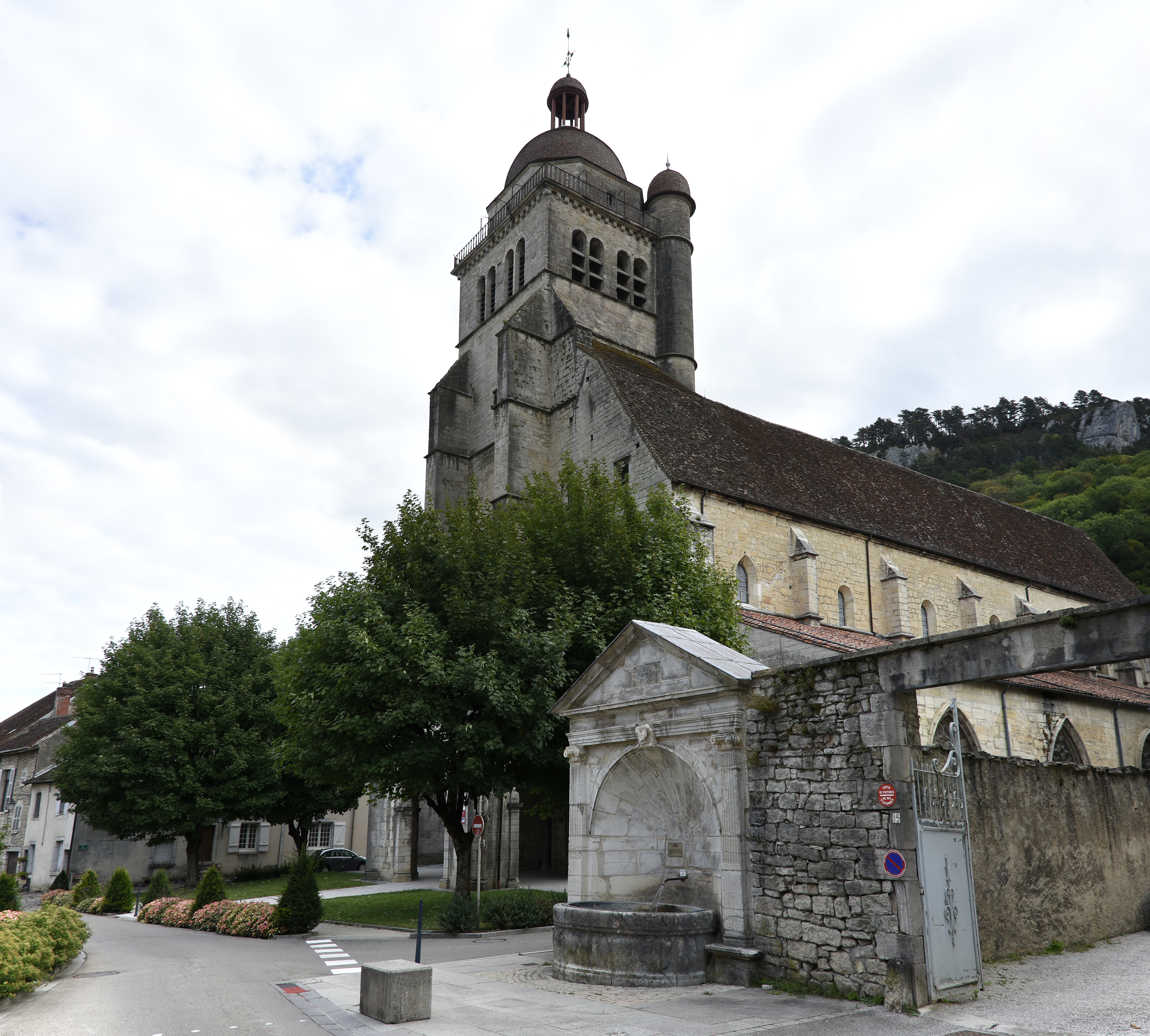 Collegiale Sint-Hippolytus, Poligny (Jura)